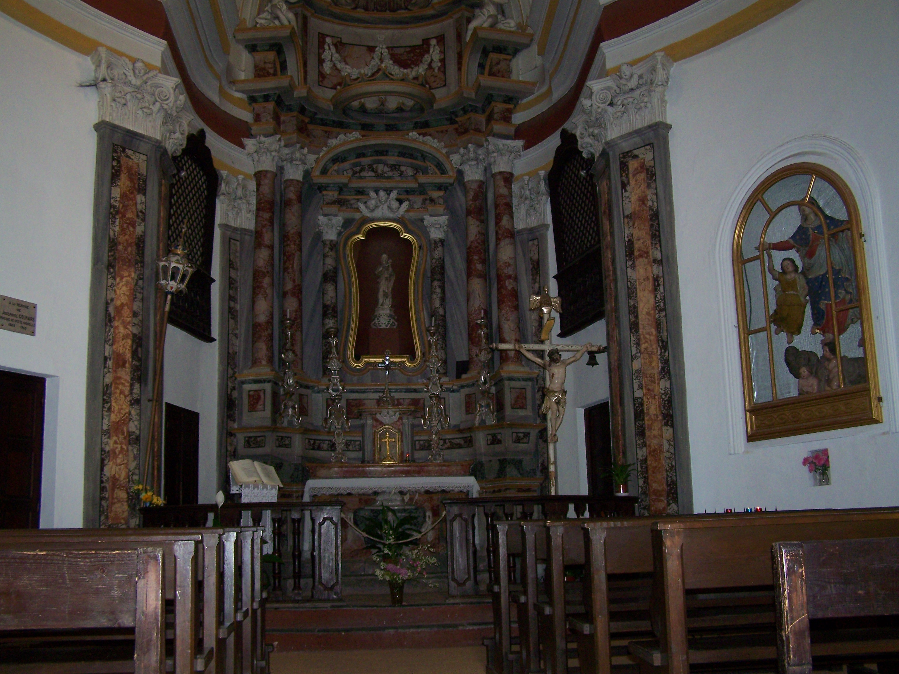 intérieur de la chapelle des pénitents blancs à Levens (Alpes-Maritimes, France)